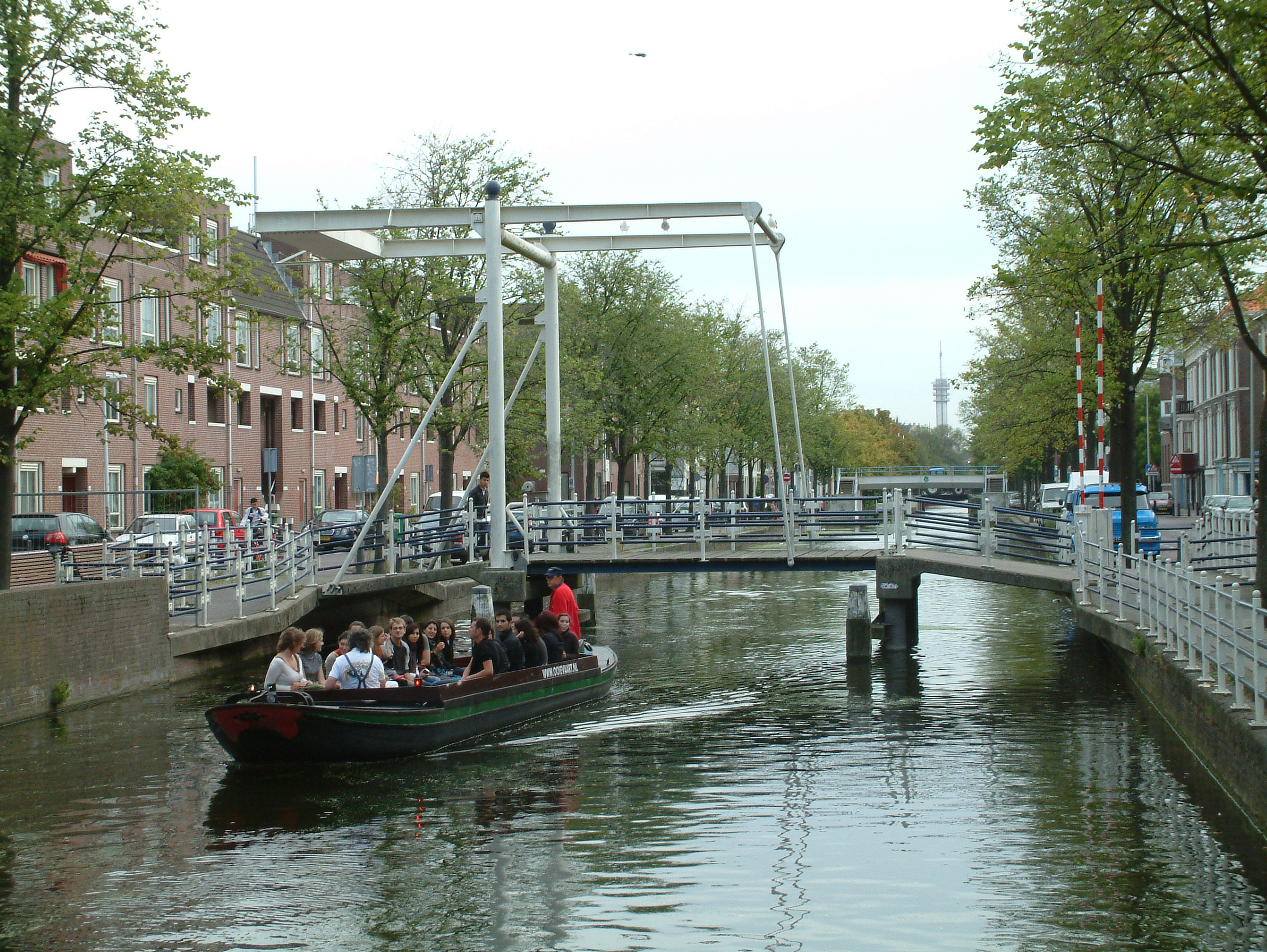 Brug in Den Haag